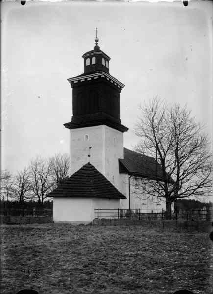 Kyrkan från sydväst, med gravkor i förgrunden.